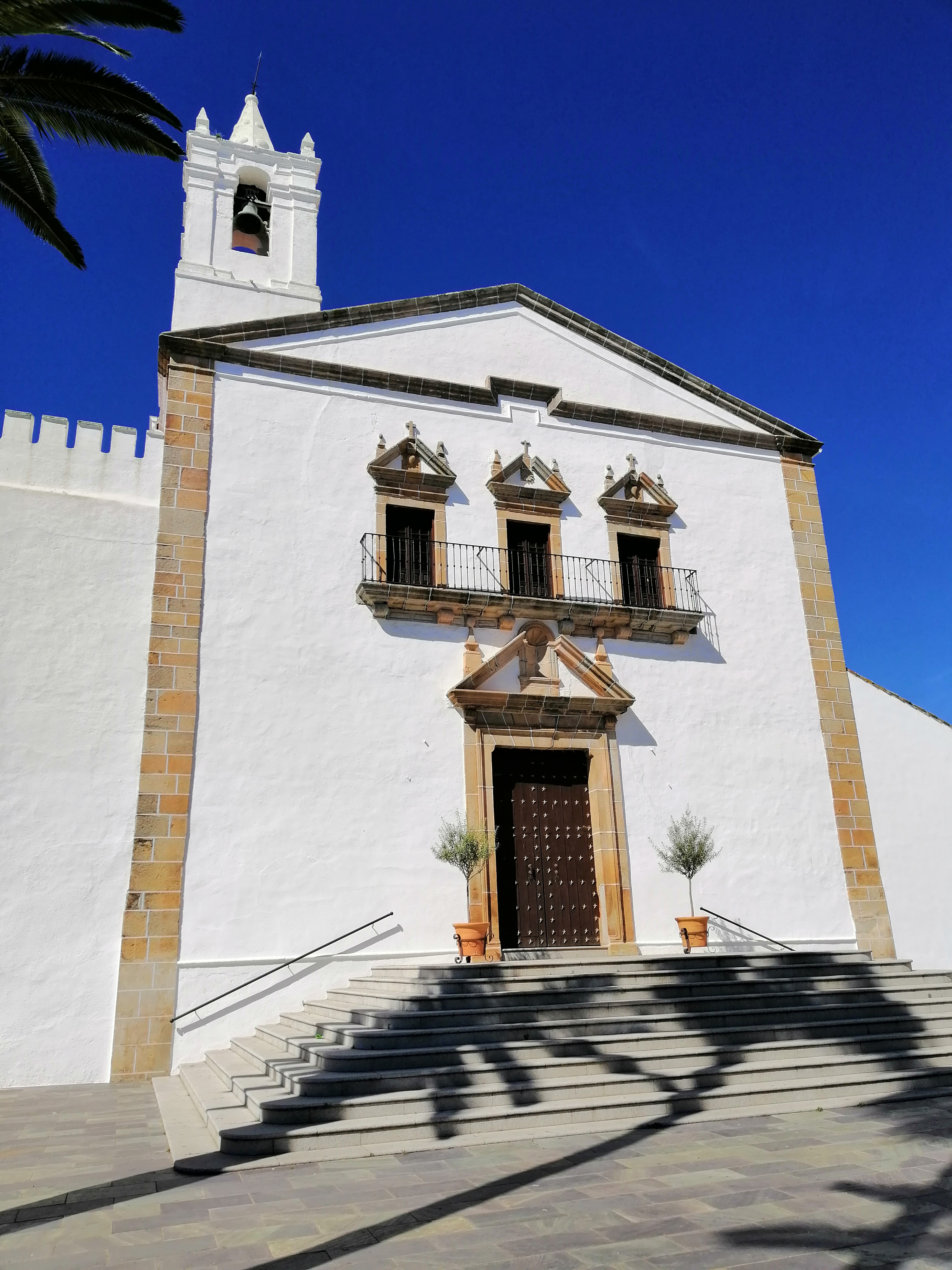 Imagen de iglesia parroquial de San Marcos Evangelista, situado en Oliva de la Frontera (Badajoz).